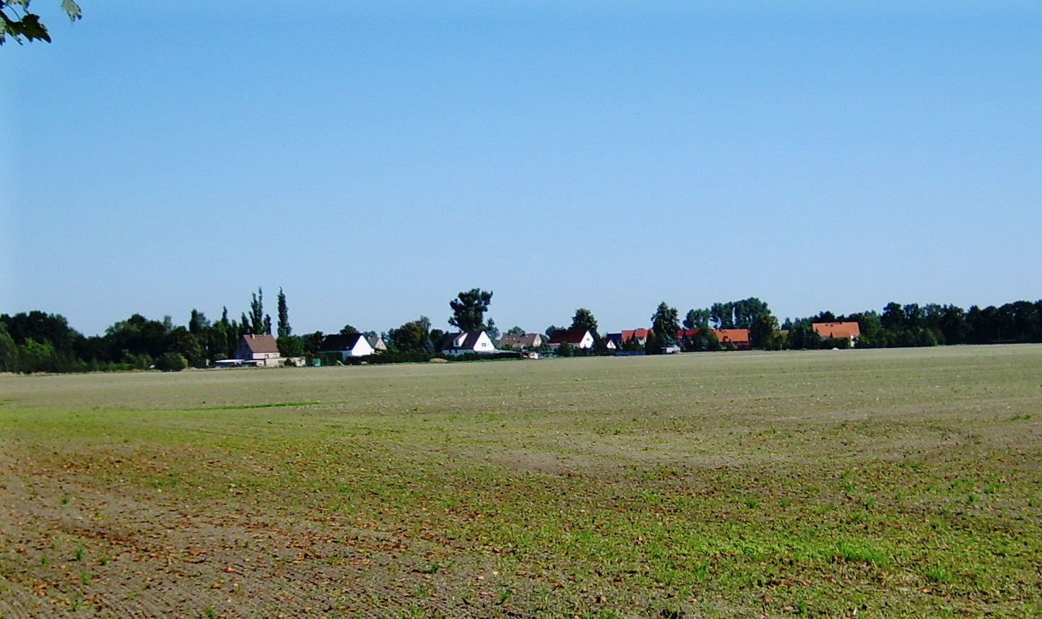 Plessa-Süd von Süden